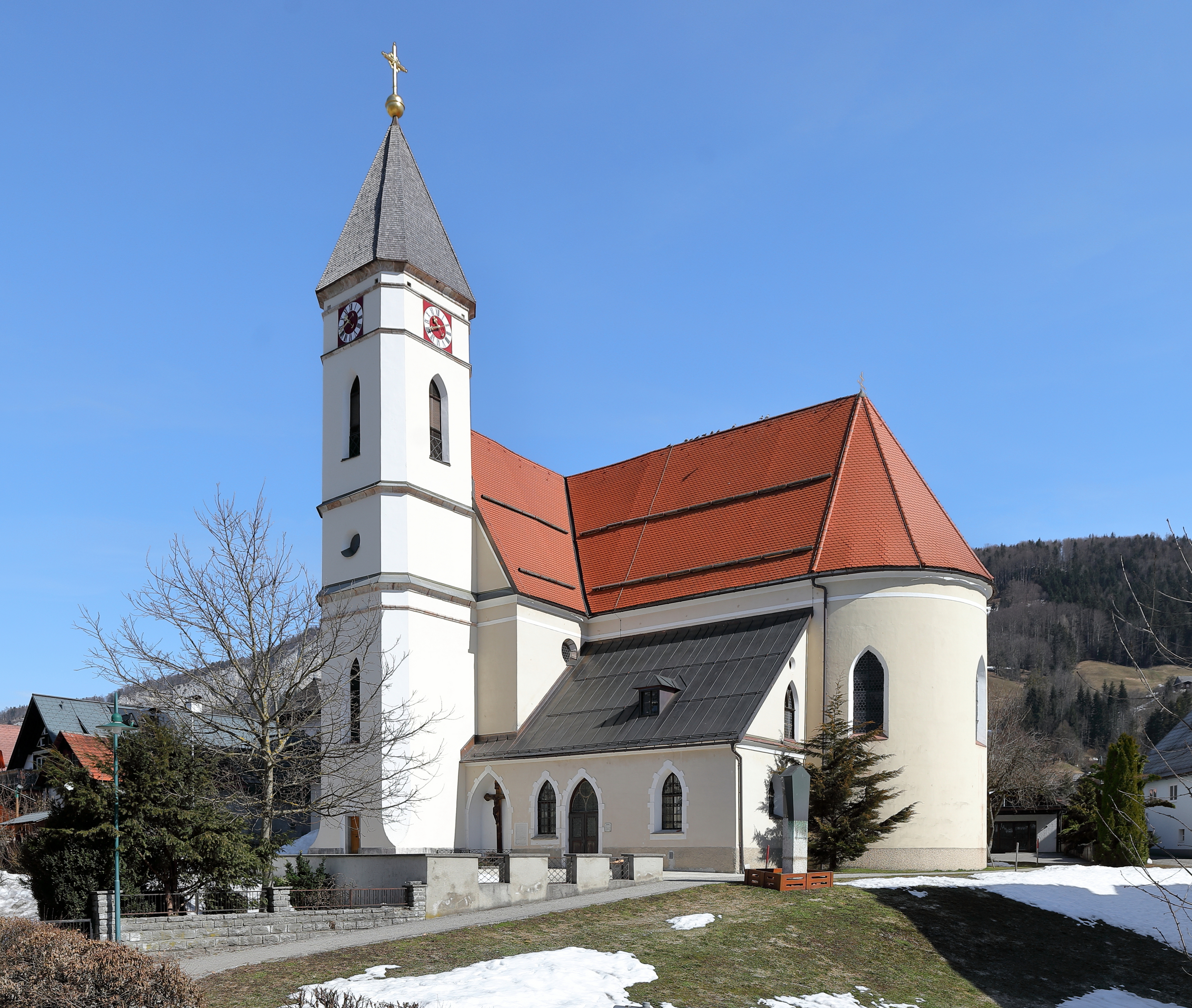 Südwestansicht der röm.-kath. Pfarrkirche hl. Martin in der oberösterreichischen Marktgemeinde Bad Goisern.Ursprünglich eine spätgotische Kirche aus dem Ende des 15. Jahrhunderts. 1835/37 erfolgte ein Neubau unter Einbeziehung der alten Kirche. Dabei wurde die Hauptachse der Kirche im rechten Winkel gedreht und der Chor der alten Kirche zu einer Seitenkapelle (Marienkapelle) umgestaltet. Rund 30 Jahre später (1863) erfolgte der Neubau des Kirchenturmes.